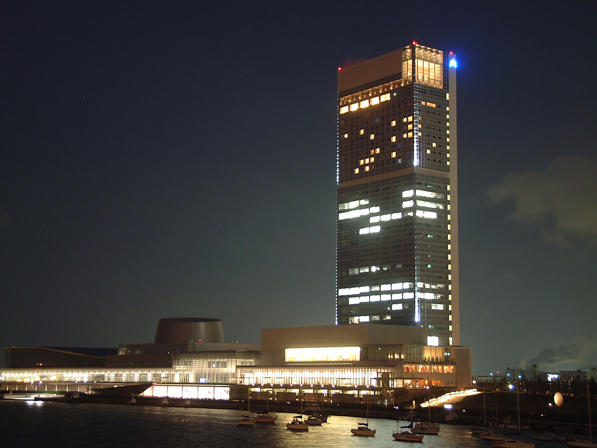 新潟市中央区万代島に立つ新潟コンベンションセンター「朱鷺メッセ」の夜景。 信濃川対岸の下大川前通側より撮影。